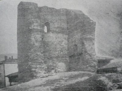 Vista del castillo de Tineo 1912